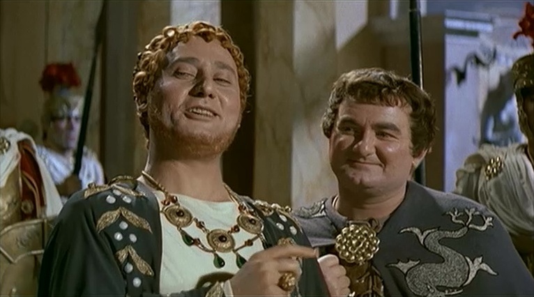 Scena del film Mio figlio Nerone (1956)